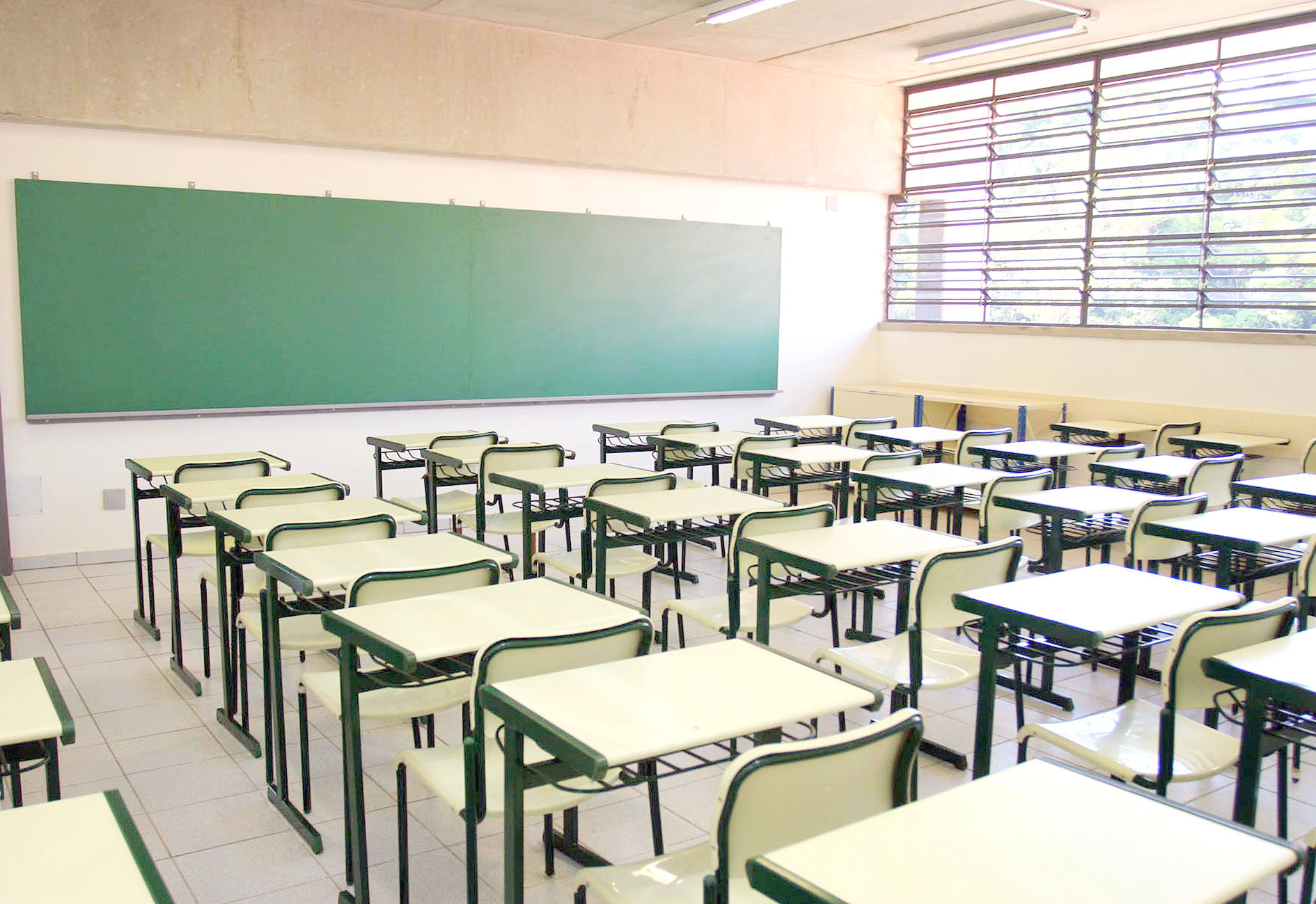 sala de aula